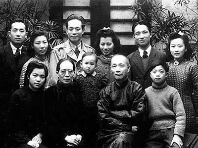 1945年抗战胜利后，何世庸一家照了张全家福。何遂在照片后面题字： 民国三十四年（即1945年）九月二日，日寇签降。双十二（12月12日） 全家聚于渝，摄影留念。抗战八年，家人无恙，长次三男均成家， 长孙申佳已三岁，殊可喜也。